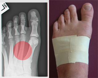 + Marschfraktur (Schema) + Tapeverband